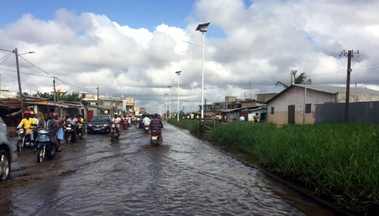 Quartier de Fidjrossé-Kpota